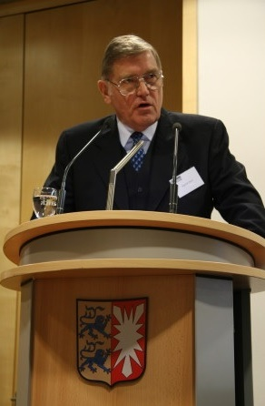 Fotografie von Konteradmiral a. D. Sigurd Hess, Ph.D., als Referent auf einer Tagung des Deutschen Maritimen Instituts in der Landesvertretung Schleswig-Holsteins in Berlin.